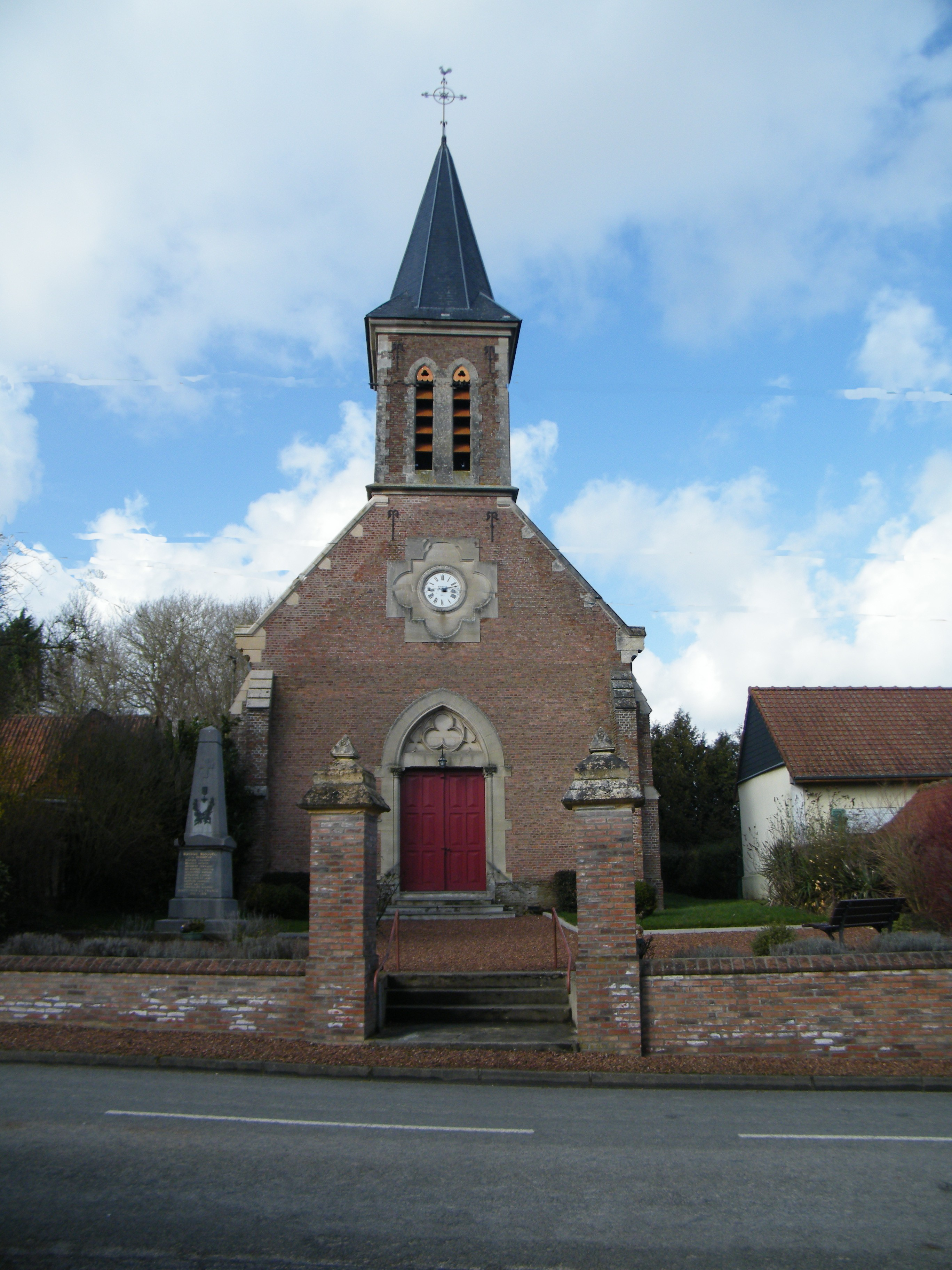 L'église de Bussus-Bussuel, Somme, France.